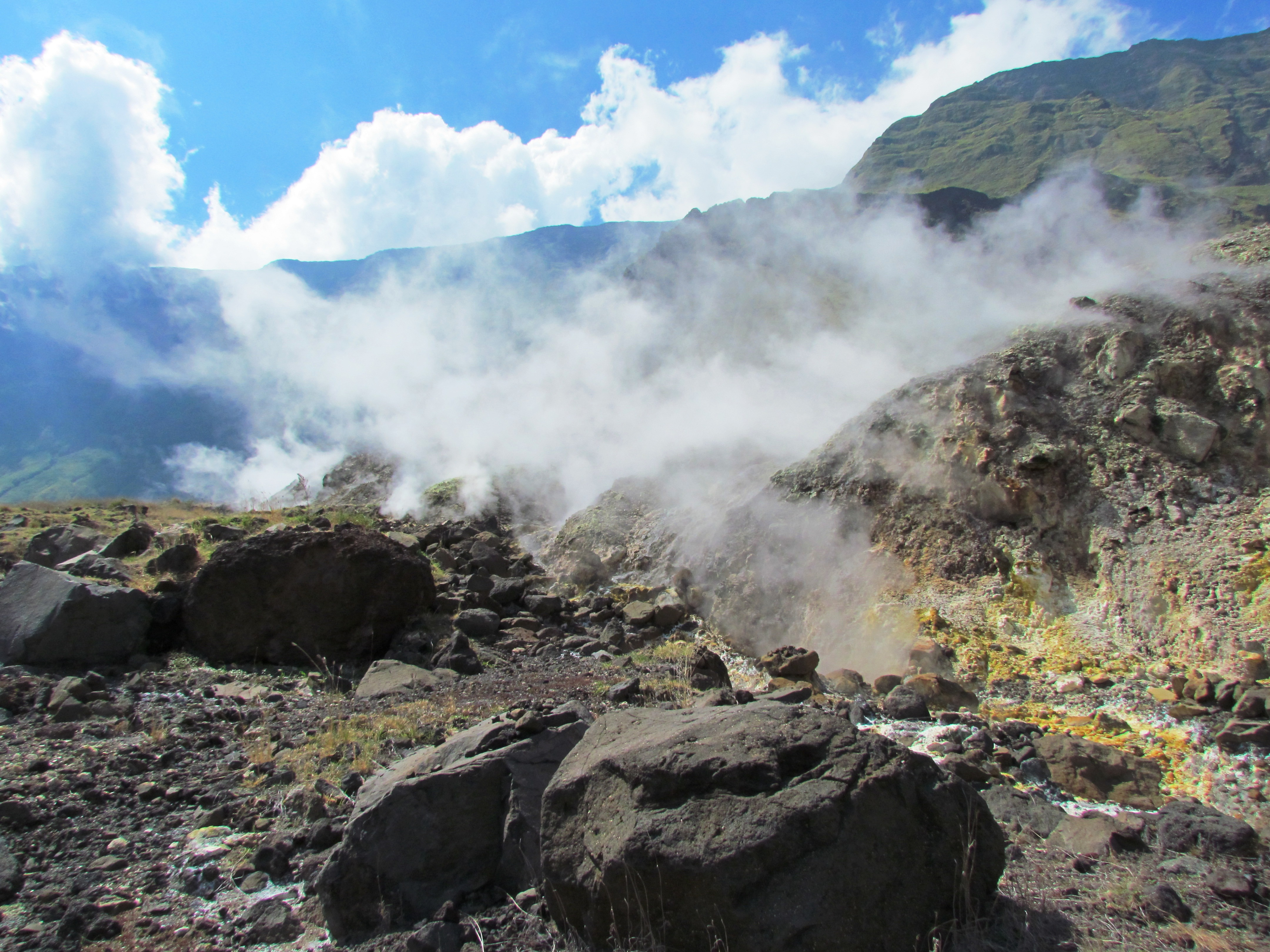 Unter hohem Druck entweichende Gase im nordöstlichen Bereich der Caldera des Tambora